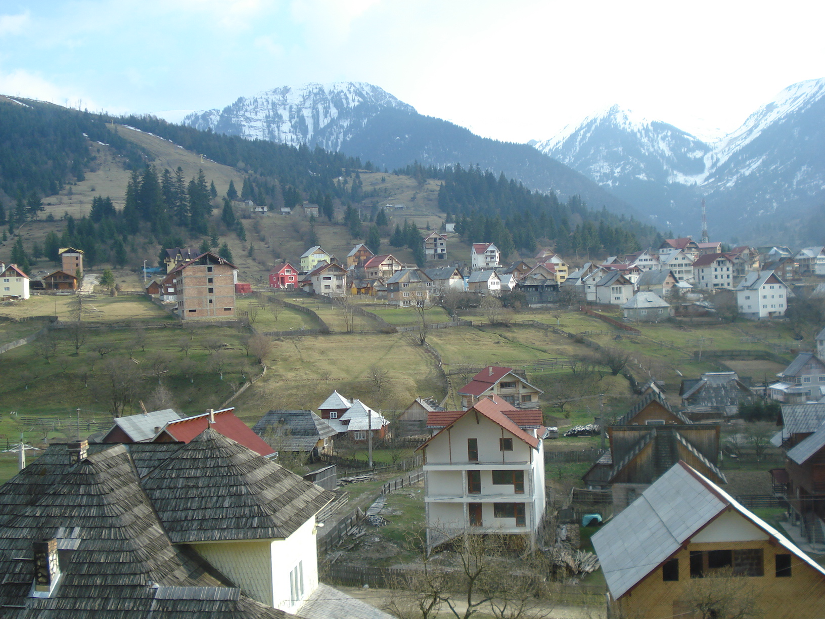 Borşa (ung. Borsa, dt. Borscha) ist eine Stadt im Bezirk Maramureş. Der Ort liegt im Tal des Vişeu-Flusses am Fuße des Rodna-Gebirges im Norden Rumäniens.